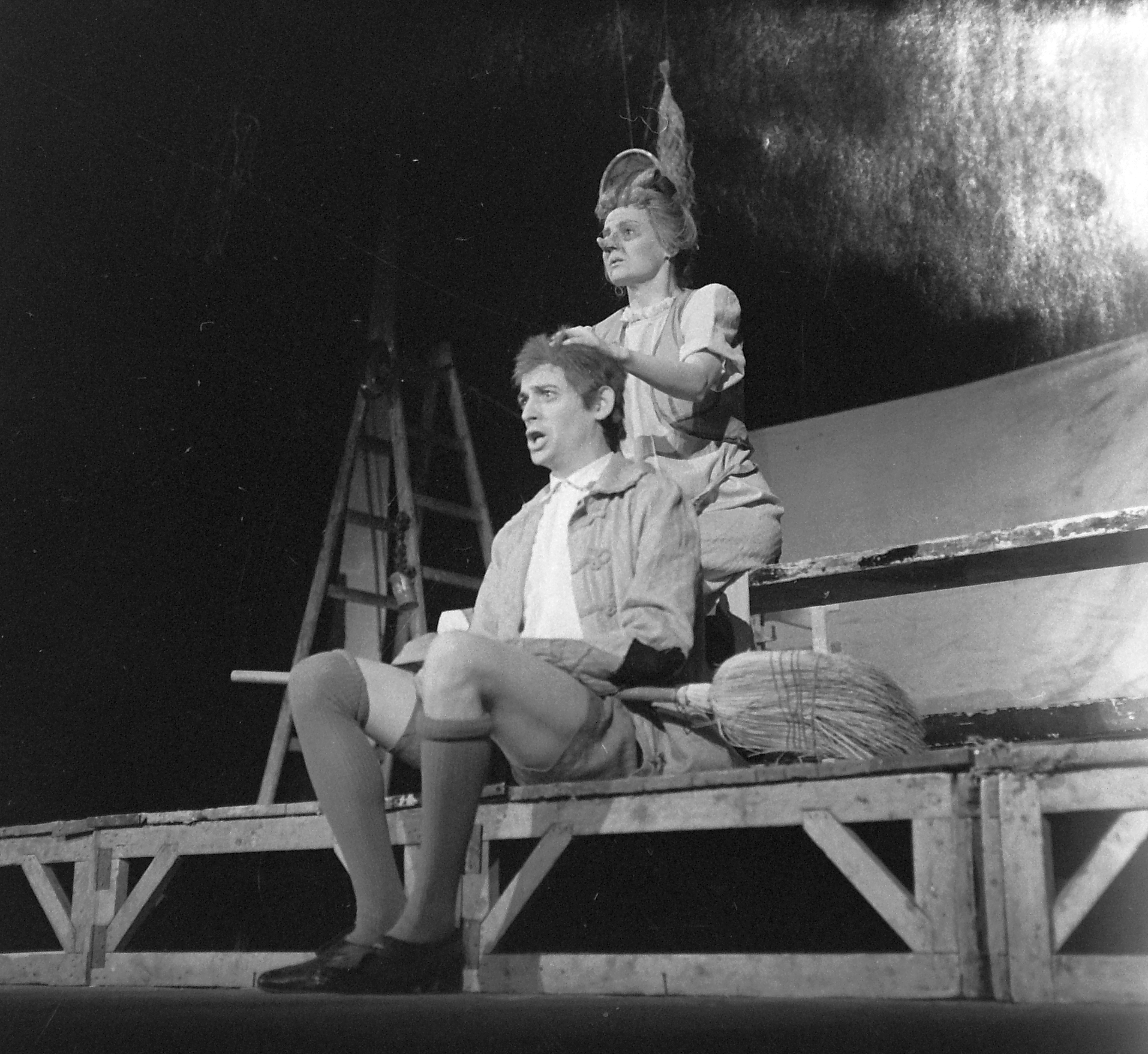 Sólyom Kati (Sólyom Katalin) és Jordán Tamás színművészek az Universitas együttes Csokonai: A' özvegy Karnyóné... c. darabjának előadásában. Location: Hungary, Budapest V. Tags: art of theater, celebrity, actor, theater performance, Budapest Title: Sólyom Kati (Sólyom Katalin) és Jordán Tamás színművészek az Universitas együttes Csokonai: A' özvegy Karnyóné... c. darabjának előadásában.